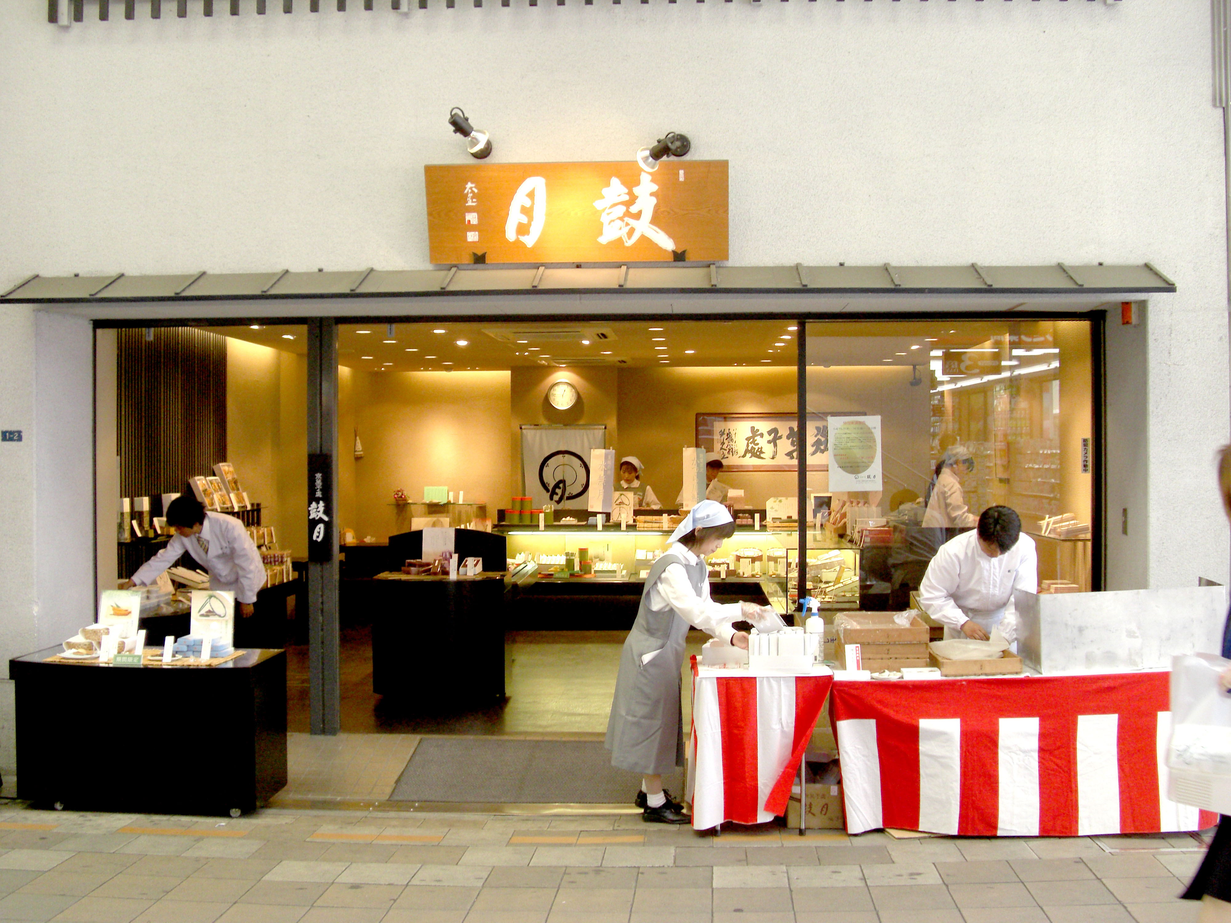 Kogetsu Ibaraki,Betsuincho Ibaraki-city Osaka Japan.